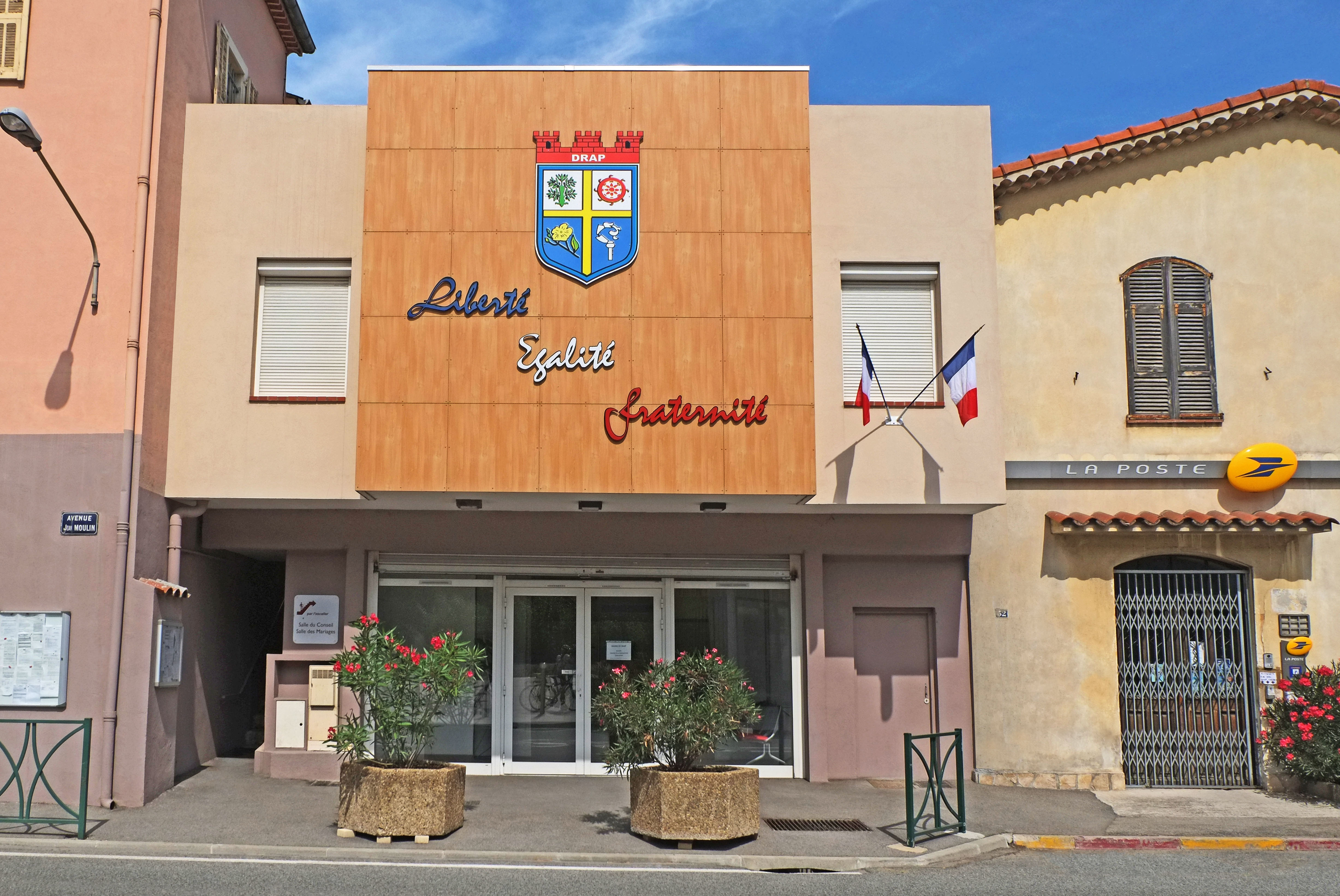 La mairie de Drap